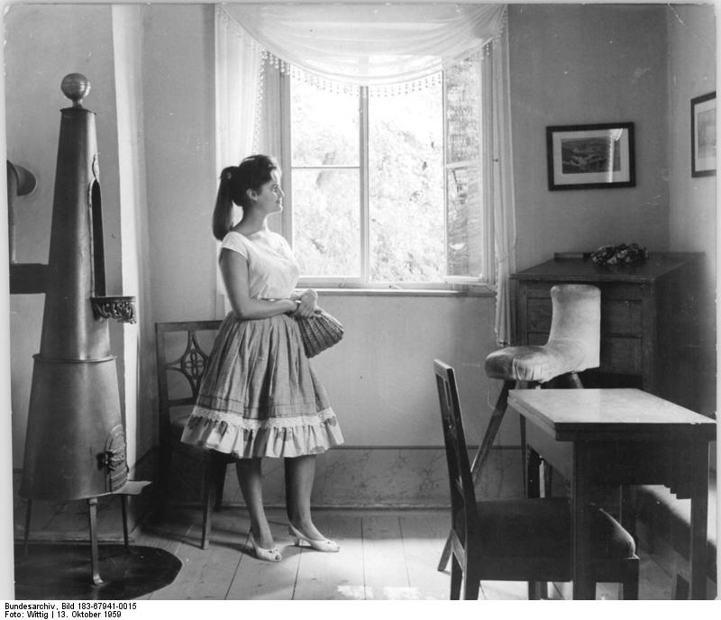 Weimar, Goethes Gartenhaus, Arbeitszimmer Zentralbild Wittig 13.10.1959 Goethe- und Schiller-Gedenkstätten in Weimar UBz: Goethes Gartenhaus - Arbeitszimmer mit dem von ihm konstruierten Reitsitz und Ofen.